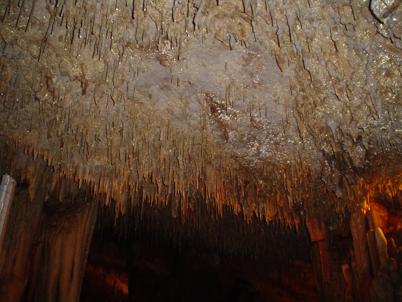 foto non professionali e assolutamente di pubblico dominio da me fatte in data 01/01/06